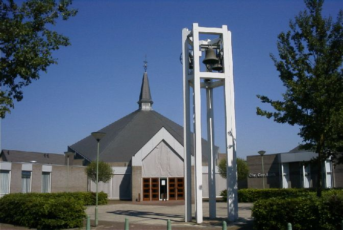 Noord Brabant Werkendam Drie klokken